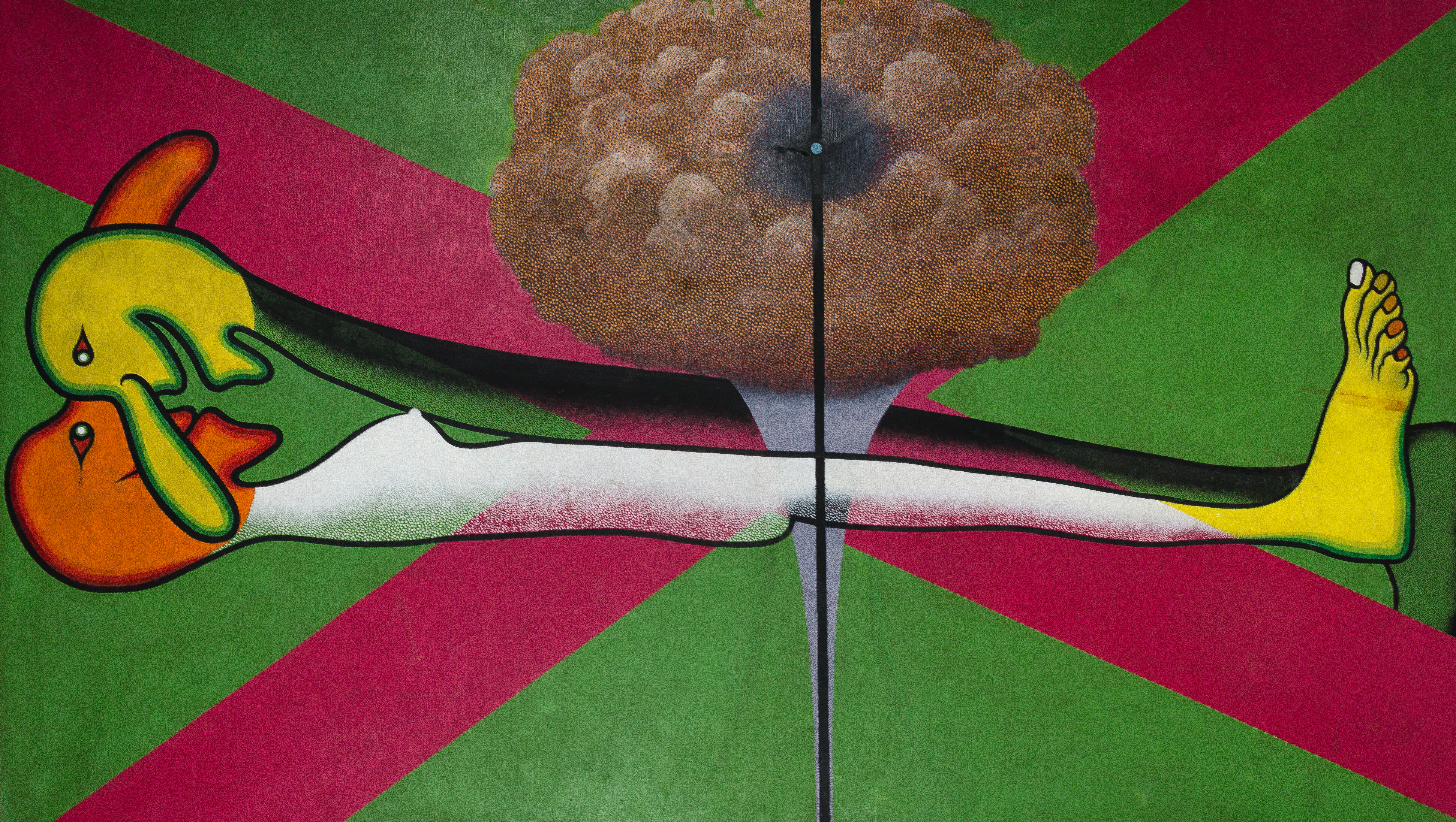 Edward Narkiewicz (1938–2007) w 1958 roku przyjechał do Polski z Litwy wraz z ostatnią grupą repatriantów. Po studiach na wydziale malarstwa warszawskiej Akademii Sztuk Pięknych karierę artystyczną zaczynał w drugiej połowie lat 60. od współpracy z Galerią Foksal. Artysta w swoim malarstwie w bardzo oryginalny sposób łączył różne porządki artystyczne. Odniesienia do awangardy surrealistycznej sąsiadują tutaj z kontrkulturową estetyką psychodelii oraz pop-artem i sztuka naiwną. Silnie obecne są również w malarstwie Narkiewicza (związane z jego biografią) odniesienia do duchowości Wschodu, konfrontowane z zachodnioeuropejskimi tradycjami artystycznymi. Obraz Narkiewicza „Bez tytułu” z 1969 roku jest jednym z najlepszych przykładów tego interesującego eklektyzmu. Podobnie jak inne obrazy artysty z tego czasu atakuje on widza mocnymi symbolami i ich zestawieniami. Jest to malarstwo okresu kontestacji, okresu nadziei na duchową przemianę ludzkości (estetyka psychodelii) oraz obaw przed jej całkowitą anihilacją (grzyb atomowy). Obraz ten zawiera w sobie specyficzną mieszankę popartowej agresji i estetyki flower power.